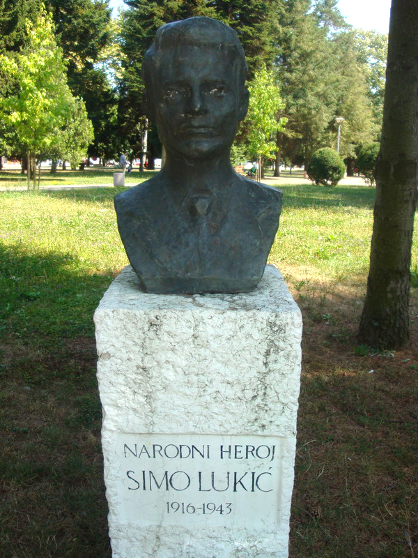 Симо_Лукић